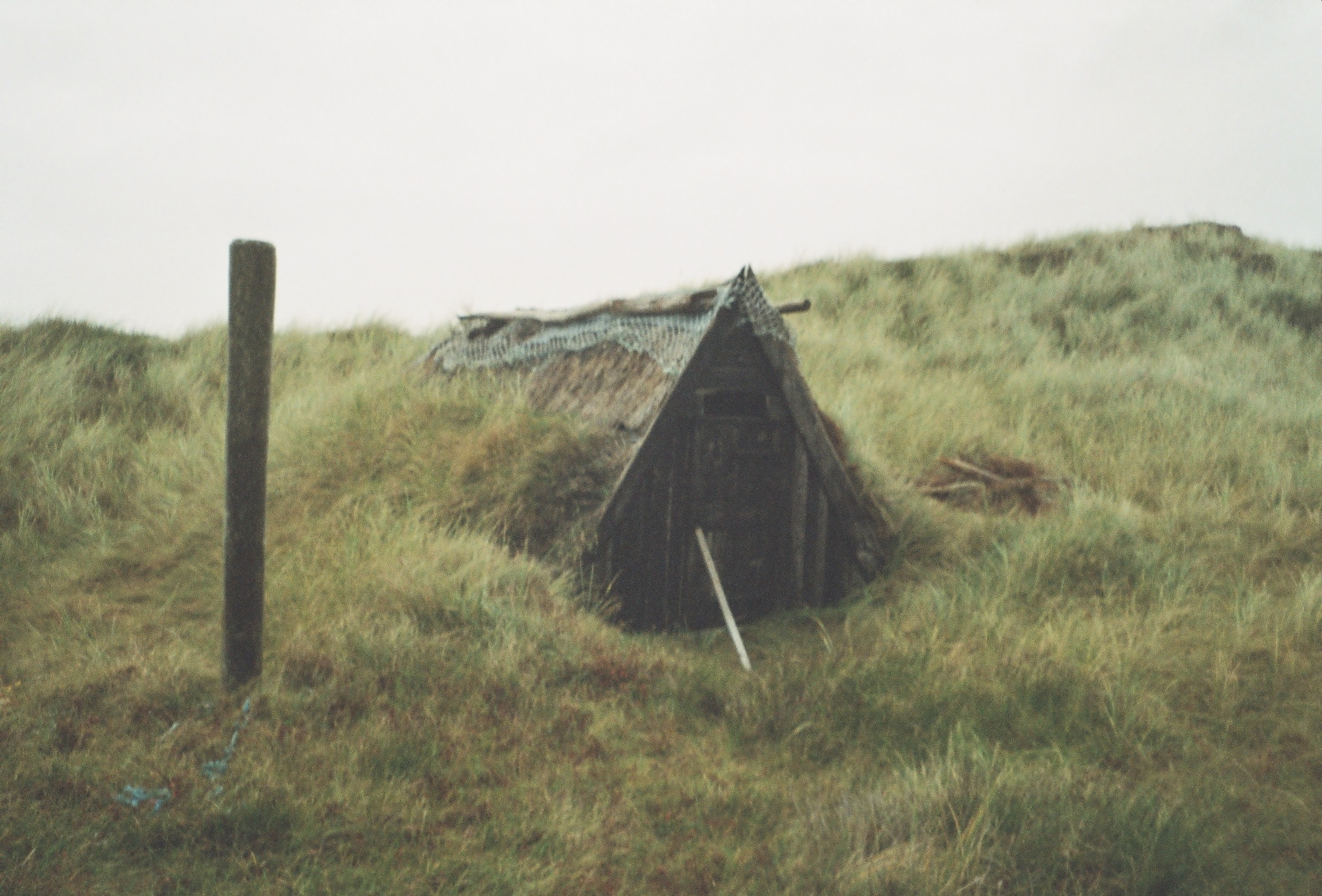 Esehus i Kærgård Klitplantage